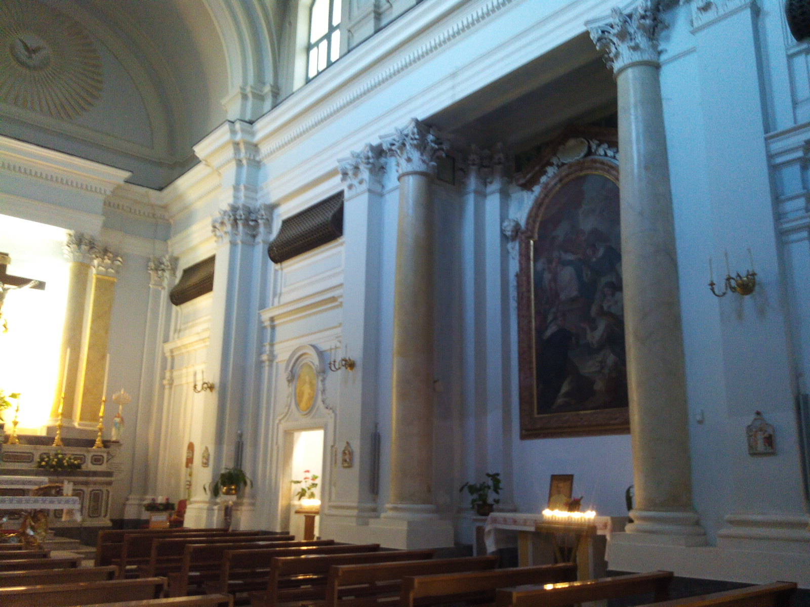 Chiesa Caserta